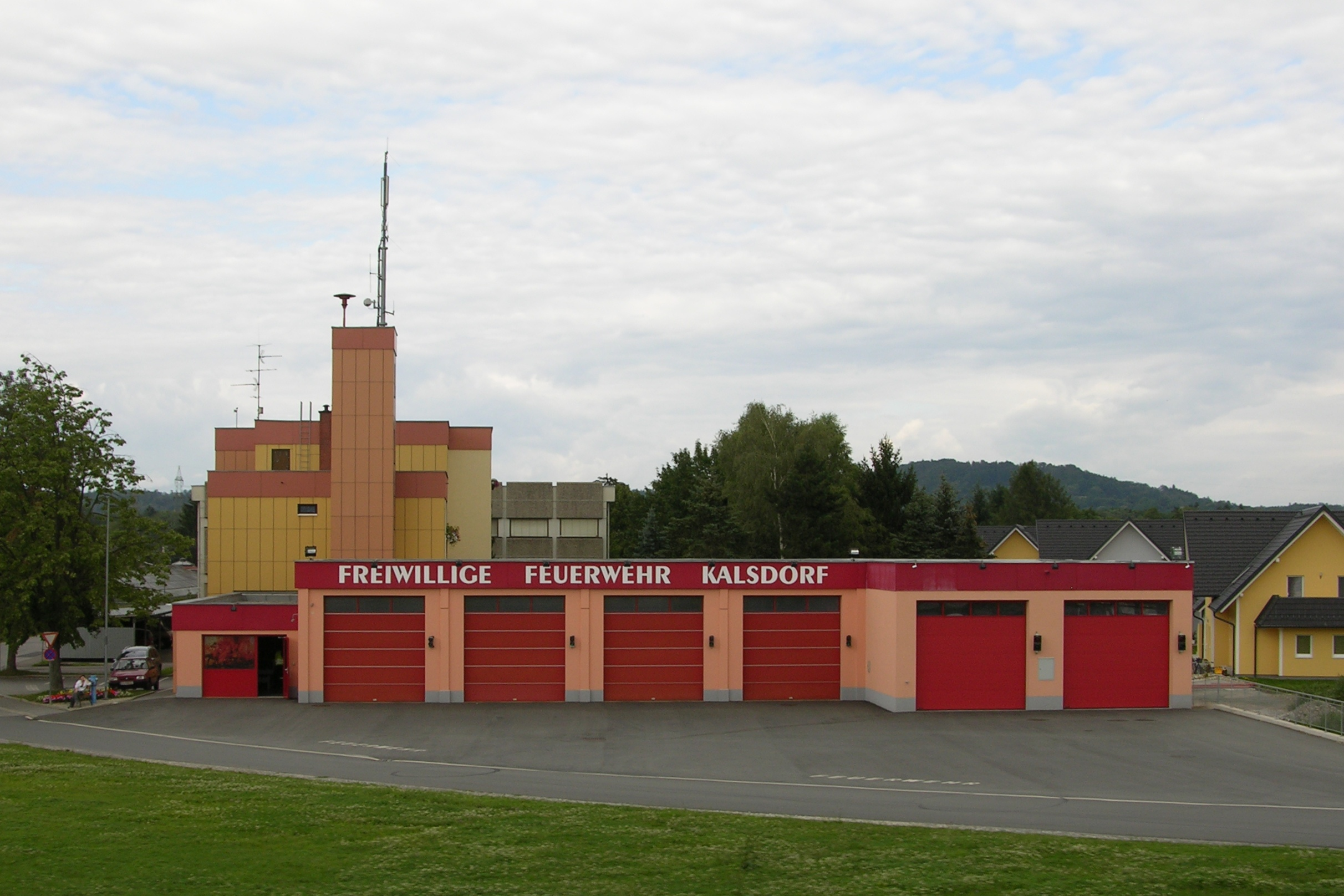 Rüsthaus der Freiwilligen Feuerwehr in Kalsdorf (2008)